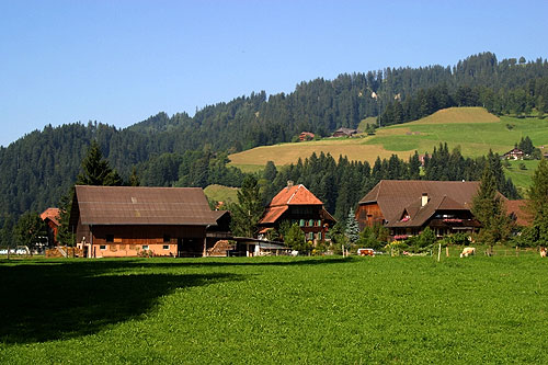 Eggiwil